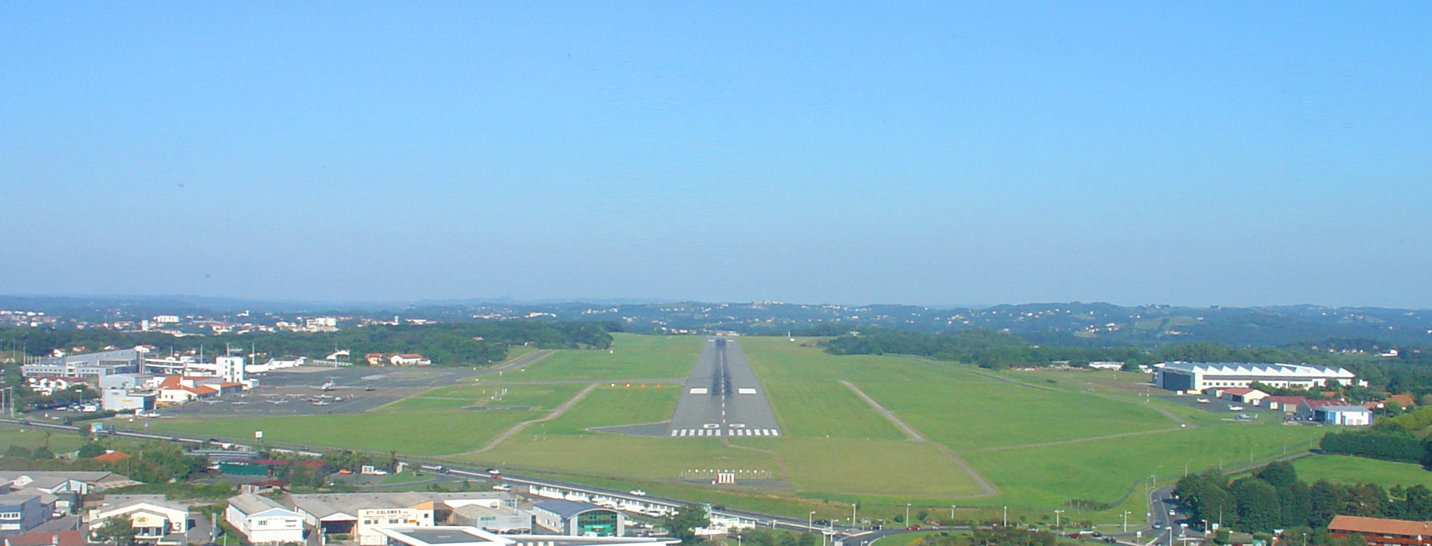 Vue aérienne de l'aéroport de Biarritz, en courte final 09